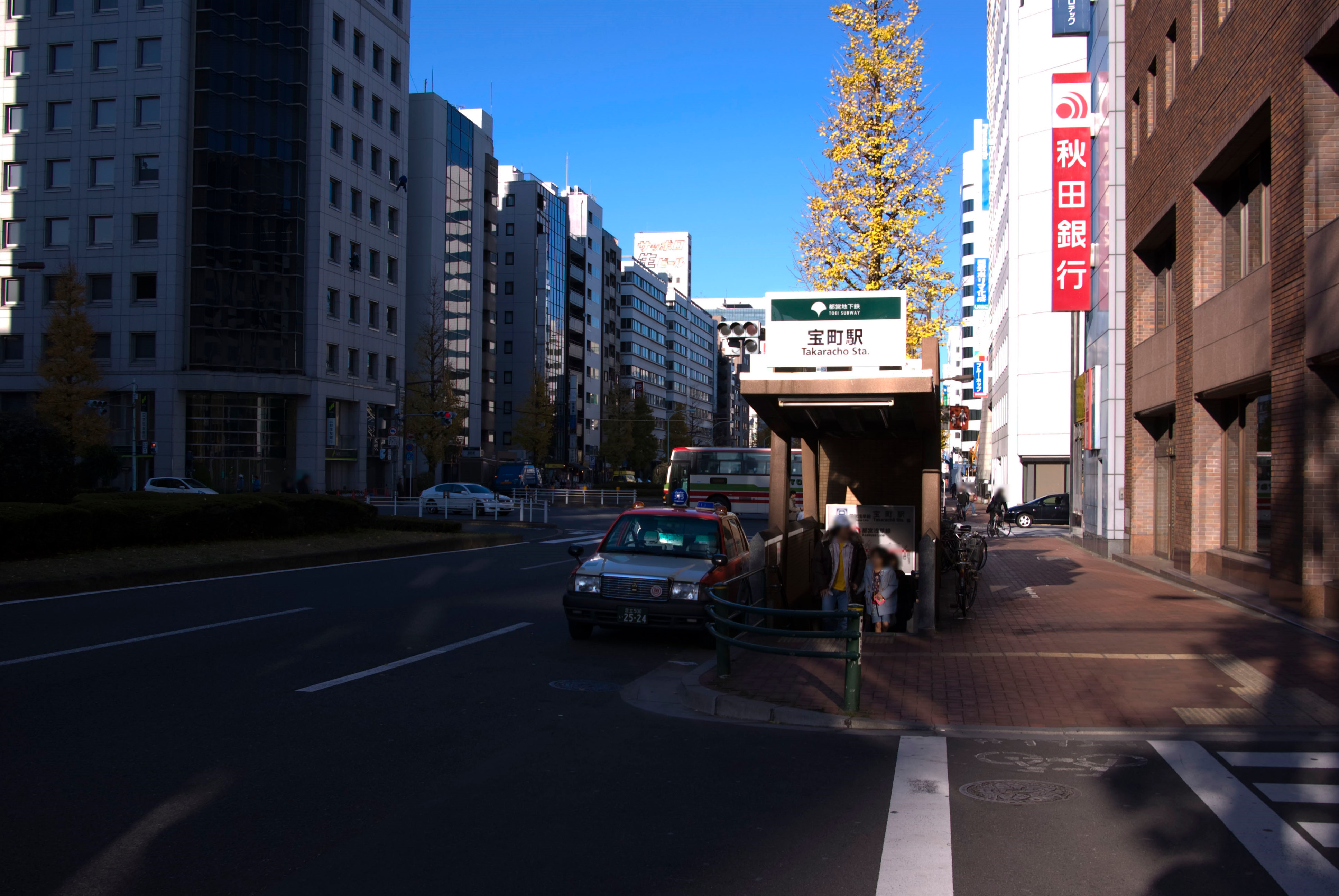 東京都交通局浅草線宝町駅